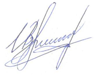 Подпись Изерского В. В.